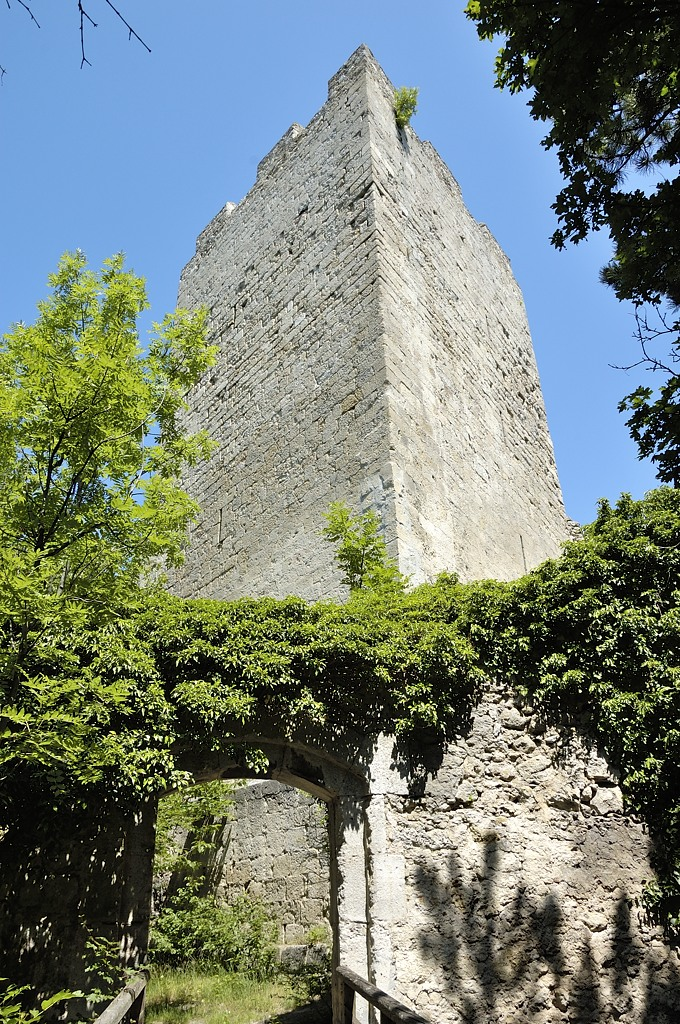 Burgruine Rauheneck